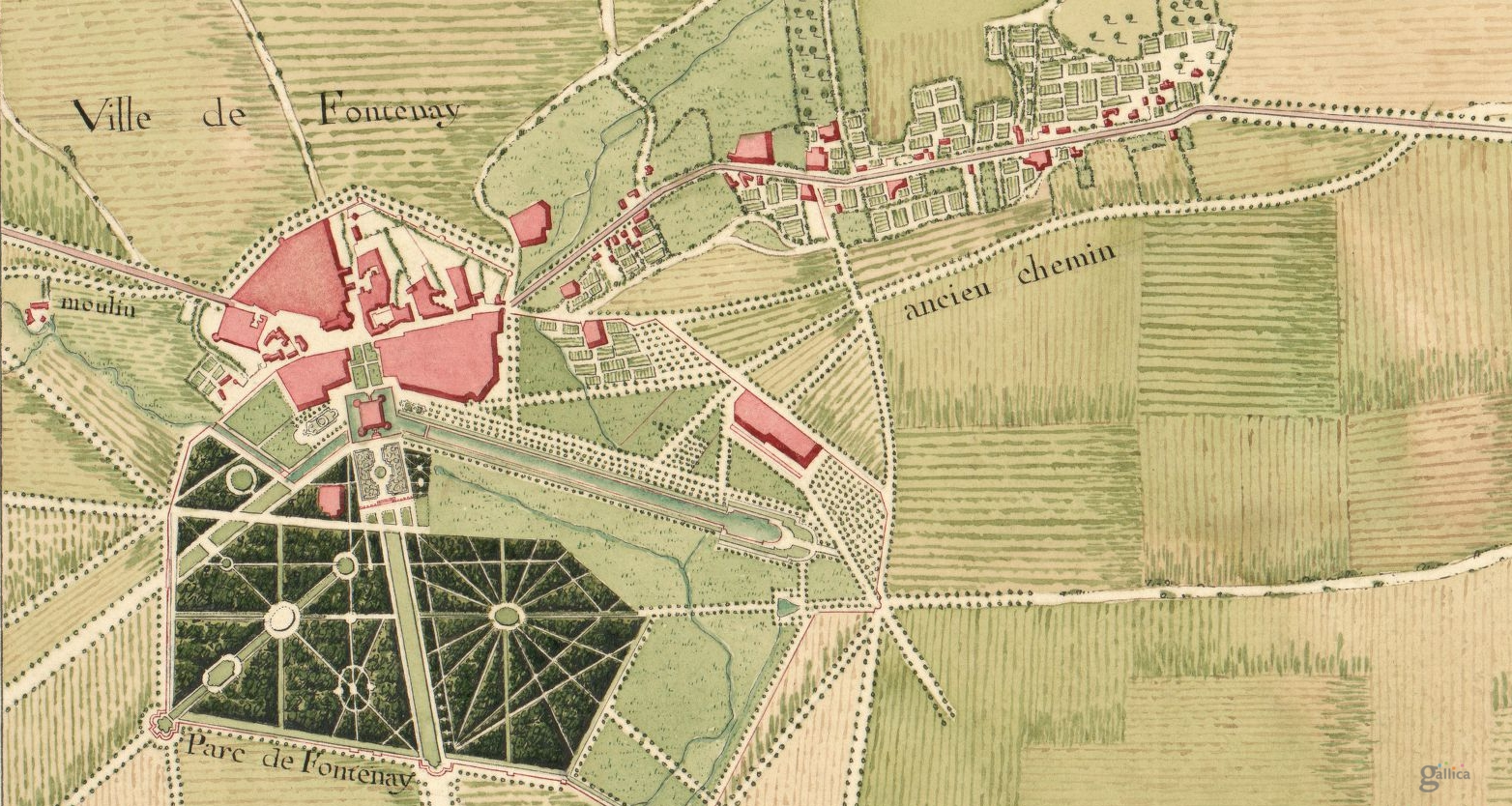 Atlas de Trudaine Fontenay et Château du duc d'Épernon